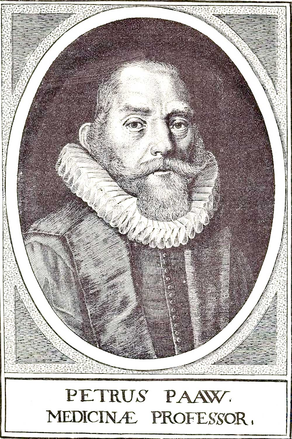 Petrus Paaw (1564-1617), niederländischer Botaniker und Mediziner